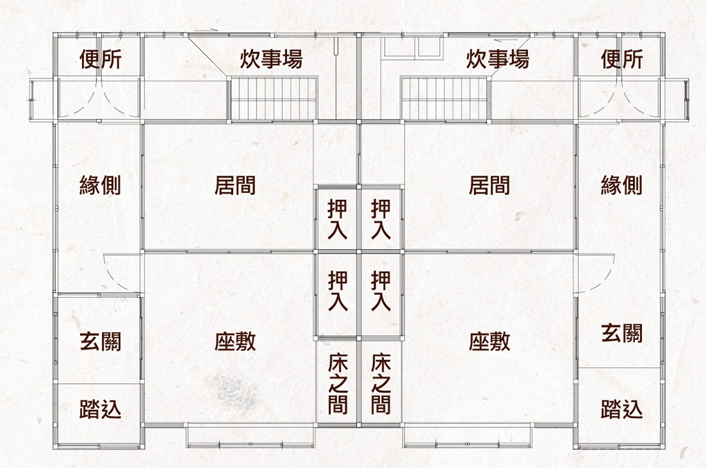 中平路故事館館舍平面圖。